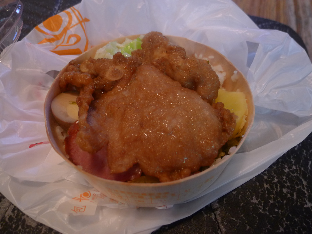 臺東池上悟饕便當